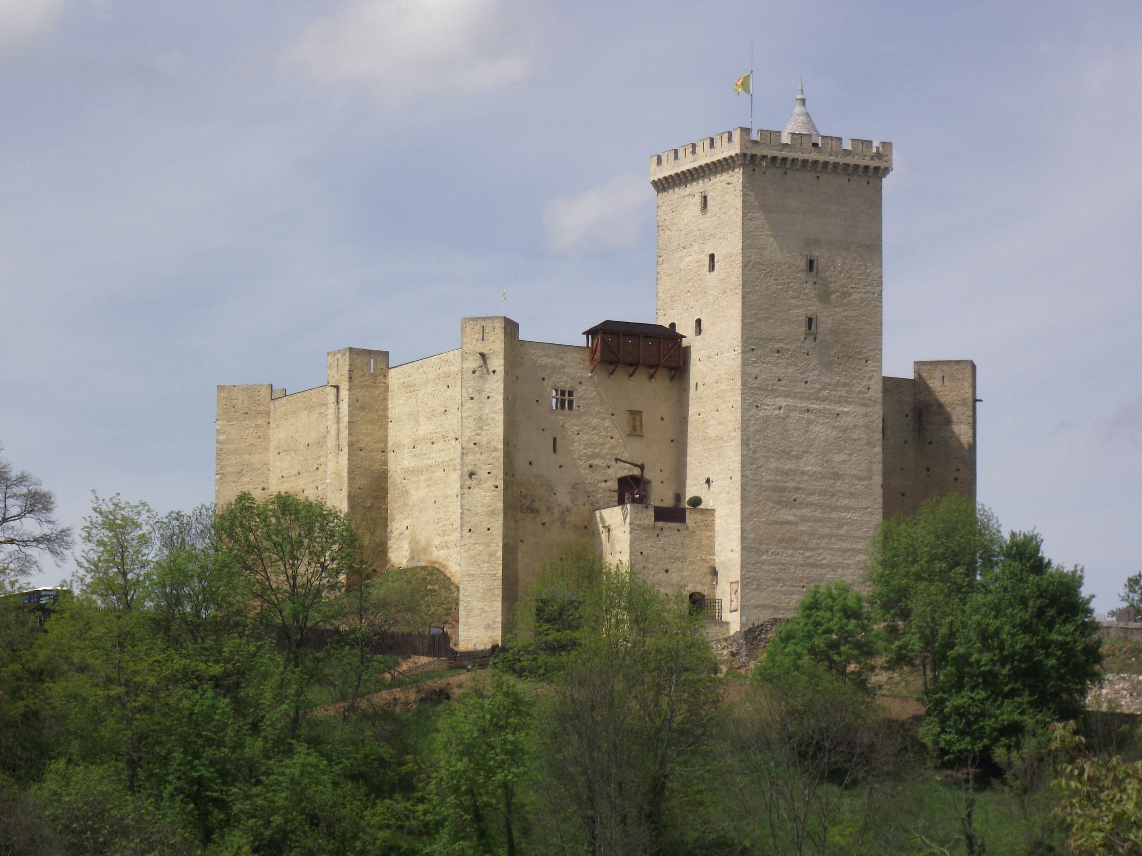 Château de Mauvezin (Hautes-Pyrénées, France)